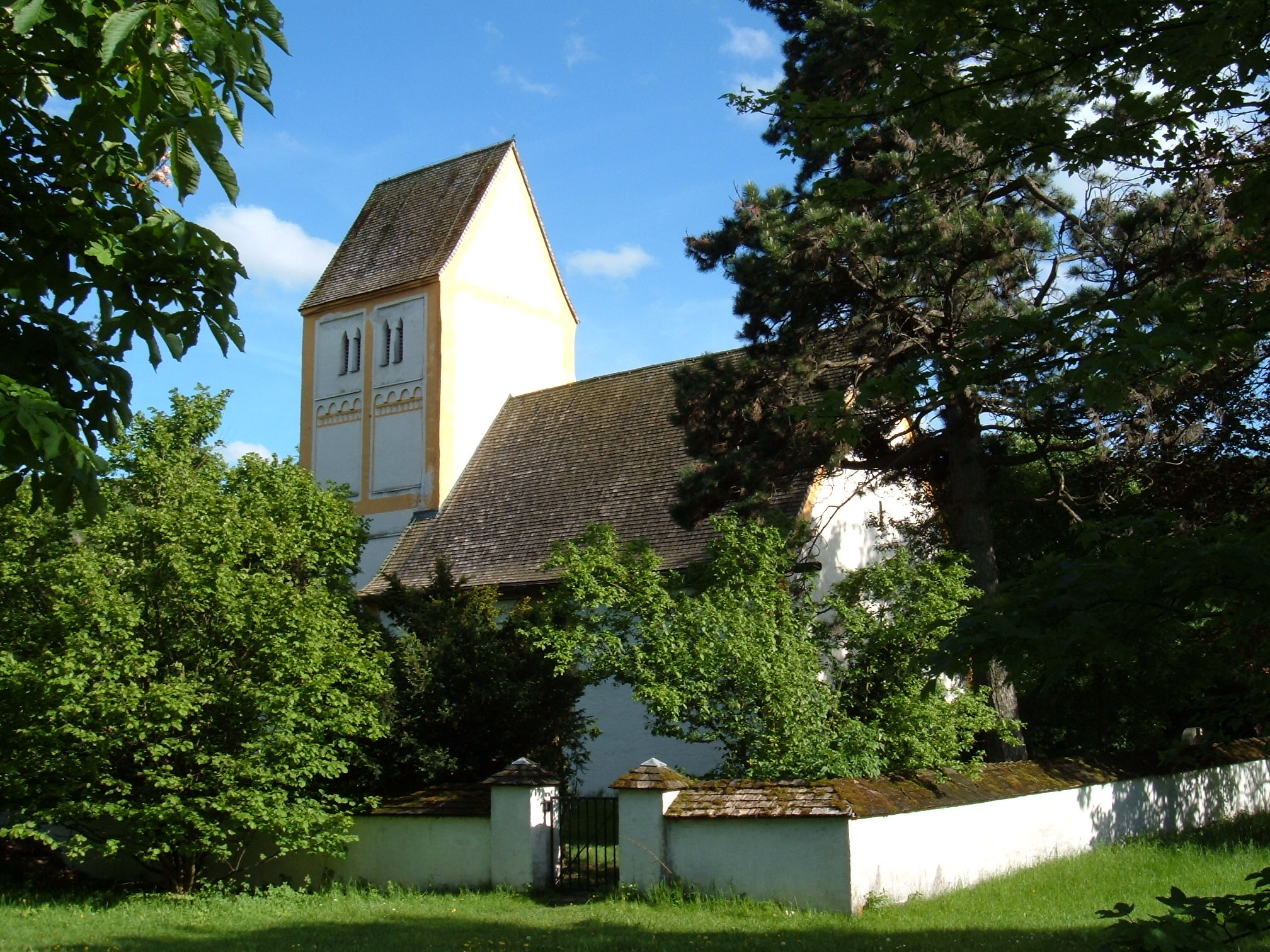 Heilig-Kreuz-Kirche Fröttmaning, Munich, Germany